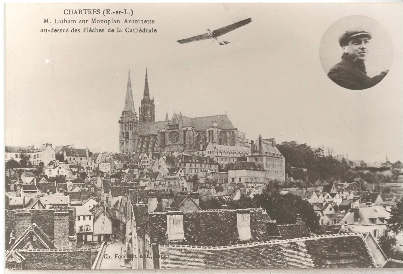 Hubert Latham Vol au dessus de la cathédrale de Chartres, Eure-et-Loir (France).